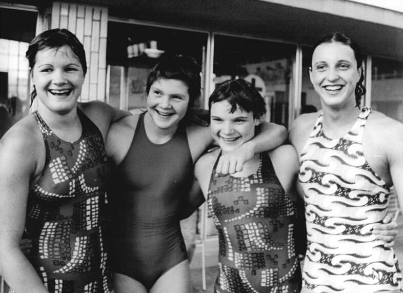 Monika Seltmann, Carola Nitschke, Andrea Pollack, Barbara Krause ADN-ZB Mittelstädt 5-6-76 Berlin: 27. Meisterschaften der DDR im Sportschwimmen (5.Tag)-Vier glückliche Berliner Dynamo-Mädchen. Im letzten Wettbewerb der diesjährigen Titelkämpfer stellten in der 4 x 100-m-Lagenstaffel Monika Seltmann, Carola Nitschke, Andrea Pollach und Barbara Krause (vlnr) mit 4:13,41 min einen neuen Weltrekord auf.